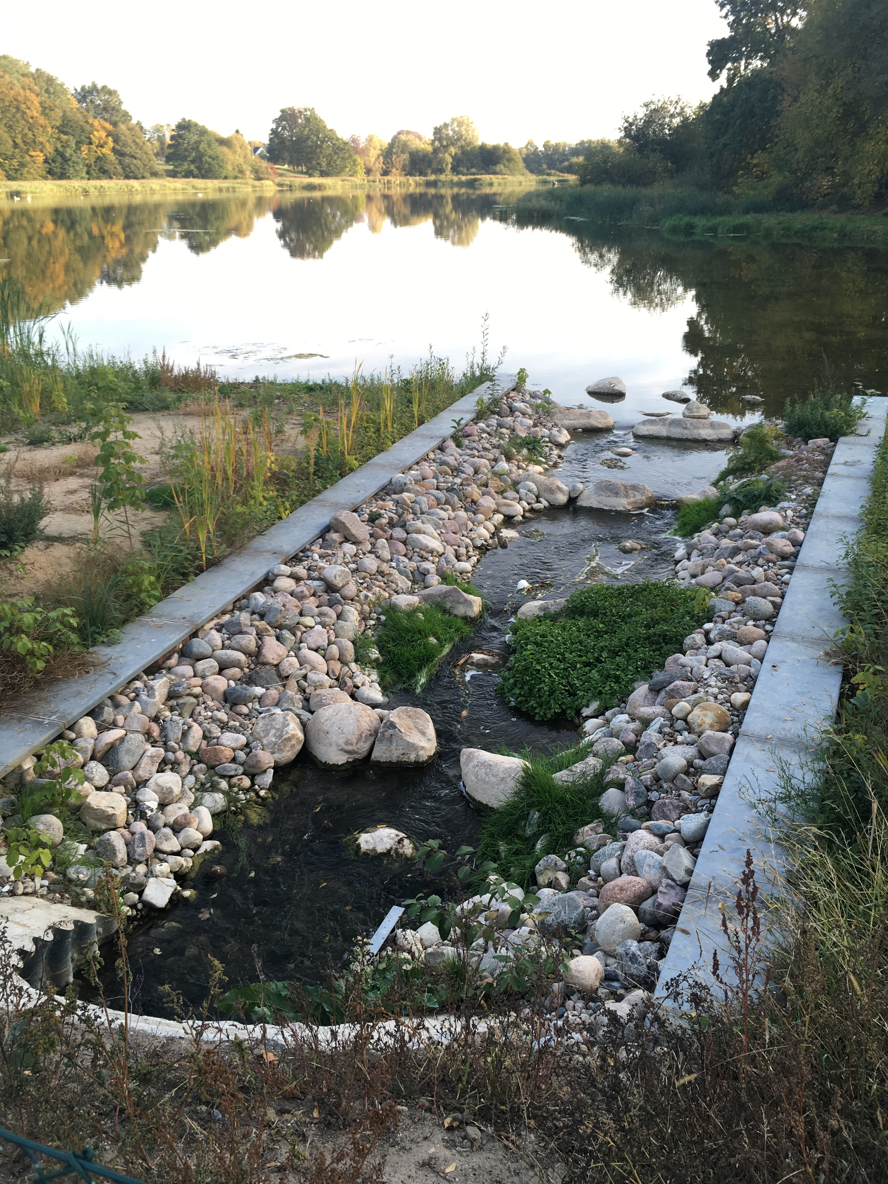 Sohlgleite am Ablauf des Speichers Faulmühle, die seit 2018 ein Wehr ersetzt und damit die Durchgängigkeit für Fische herstellt.